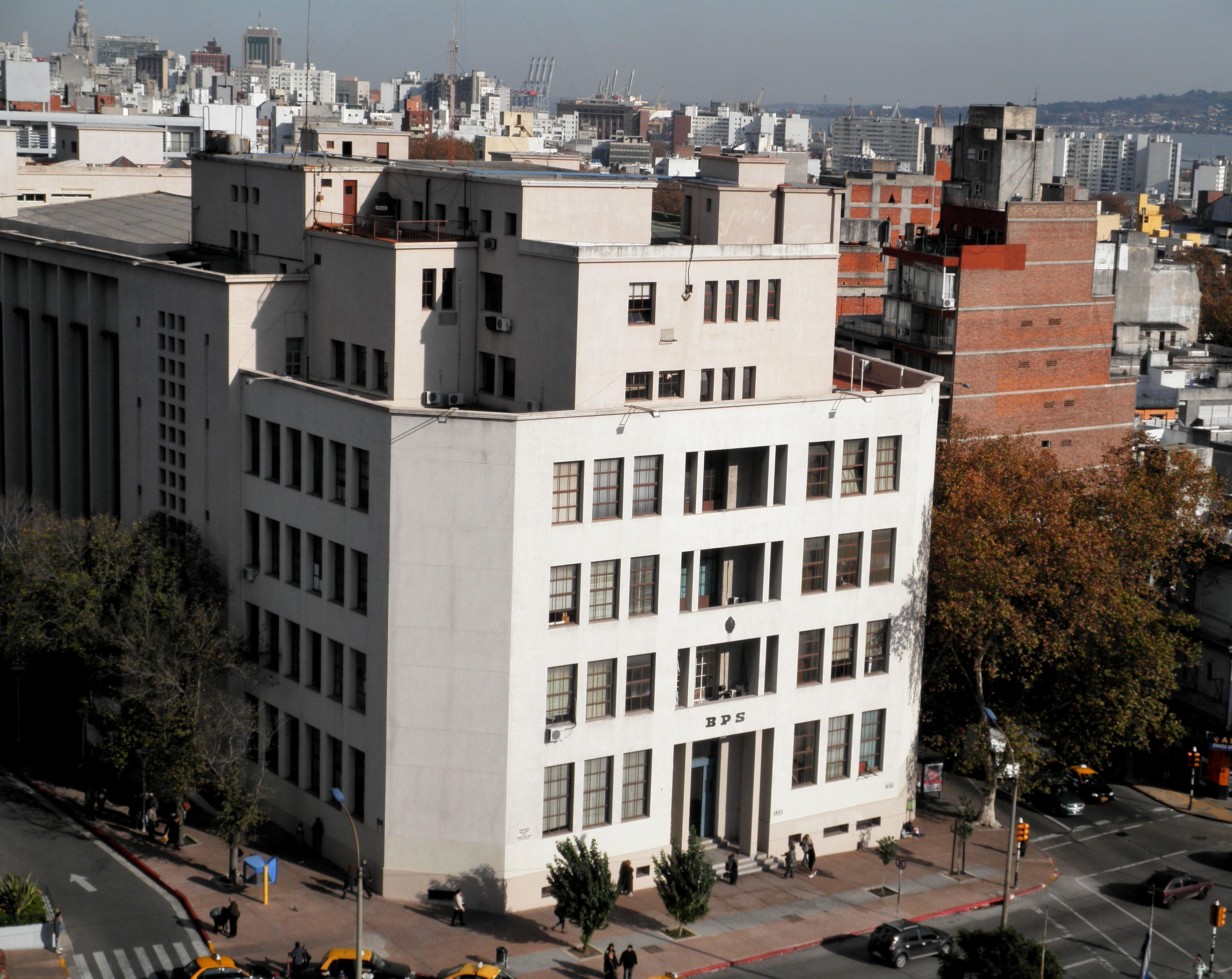 Banco de Previsión Social. Ubicada en el departamento de Montevideo